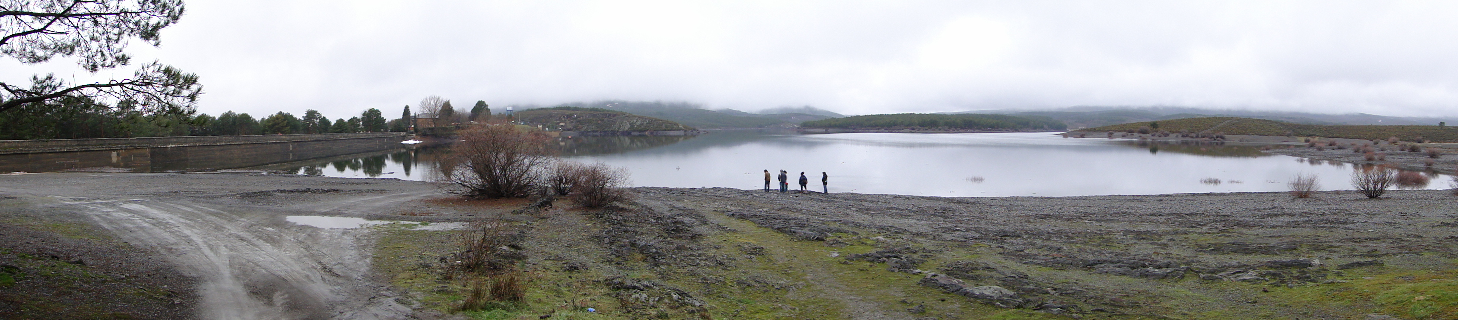 Embase Villameca 18/01/2010